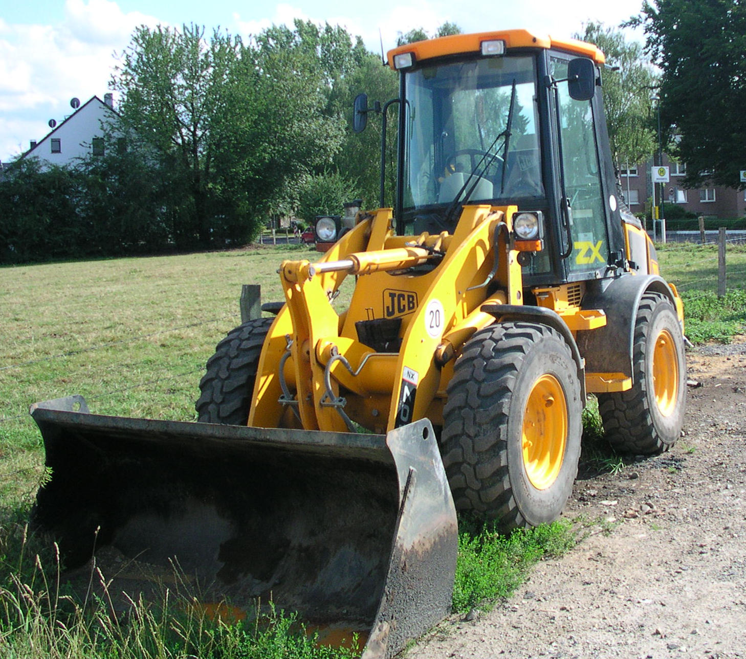 JCB 407 in Aachen hydraulische Klappschaufel 0,8m³ Überladehöhe : 2957mm, Kipplast: 3600kg, 4 Zylinder Diesel Motor Hubraum 4400cm³ 79 PS